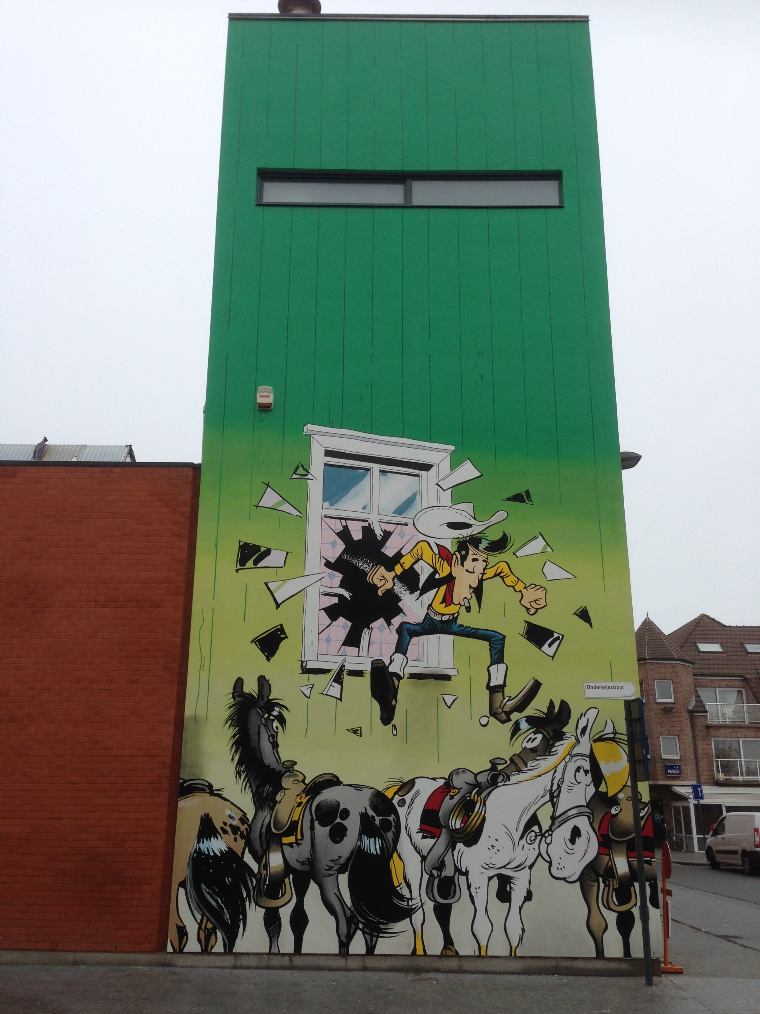 Centrum De Branding, Populierlaan 35, 8430 Middelkerke - ingehuldigd op 16 november 2016